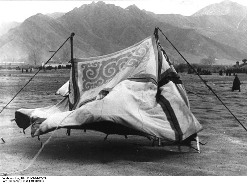 Lhasa, Neujahr, Zelt im Wind